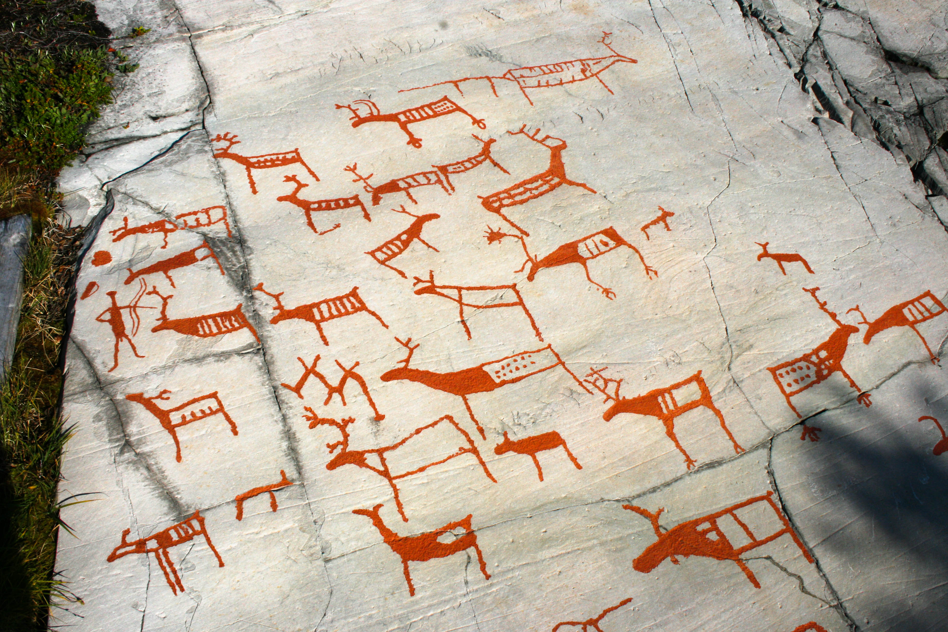 Helleristninger i Alta.